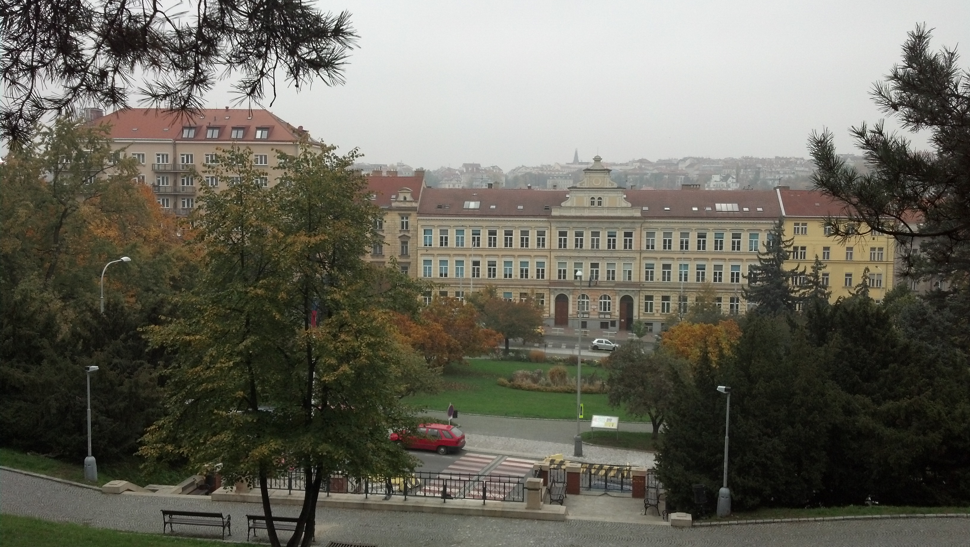 Jiráskovy sady v Praze 4